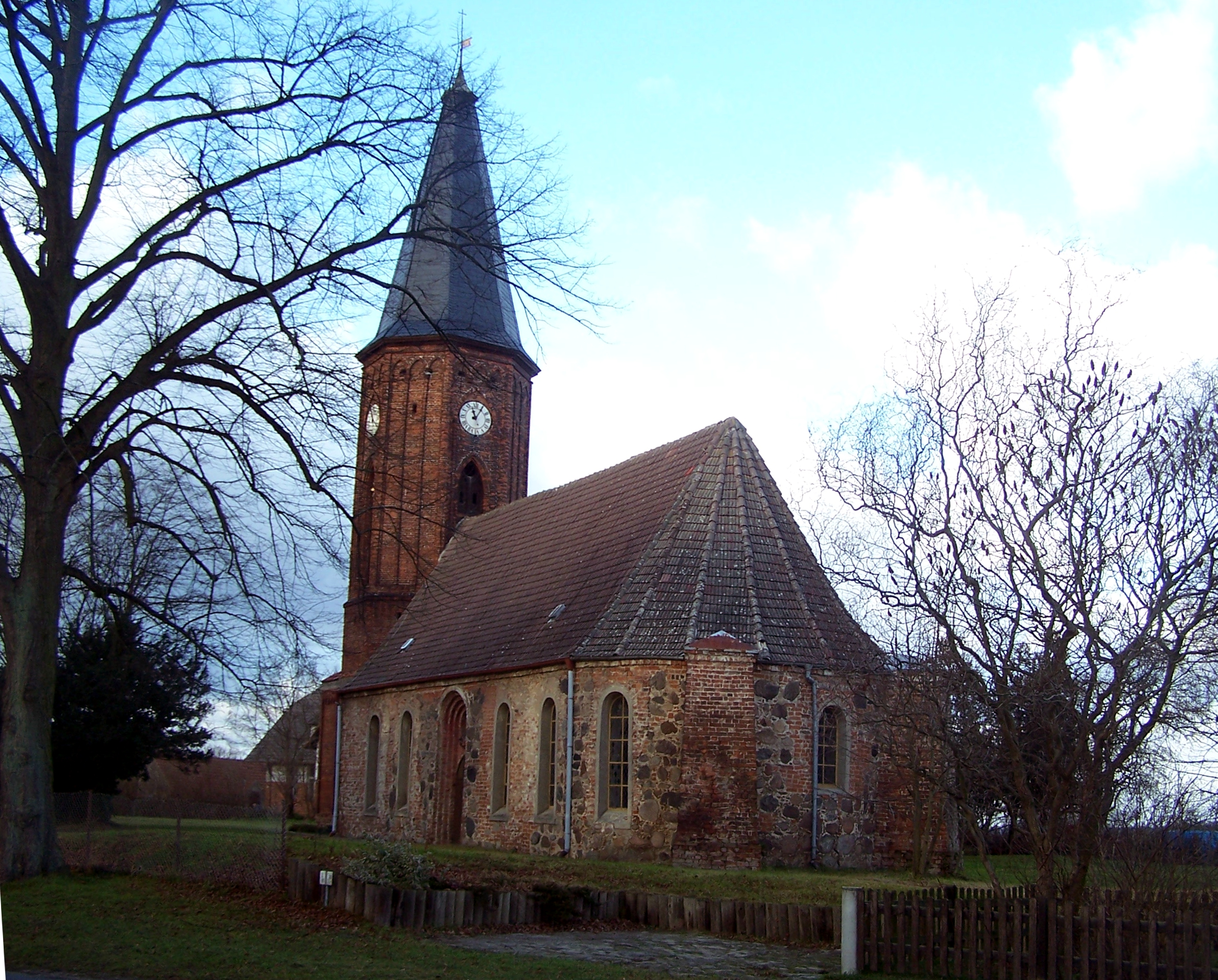 Kirche in Wachow, einem Ortsteil von Nauen